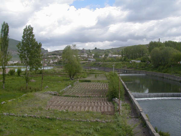 Vorotan River, Sisian, Syunik Province, Armenia.